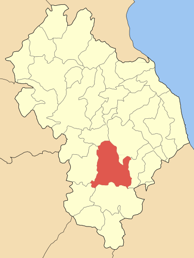 Locator map of Nikaias municipality (Δήμος Νίκαιας) at Larisa perfecture, Greece.